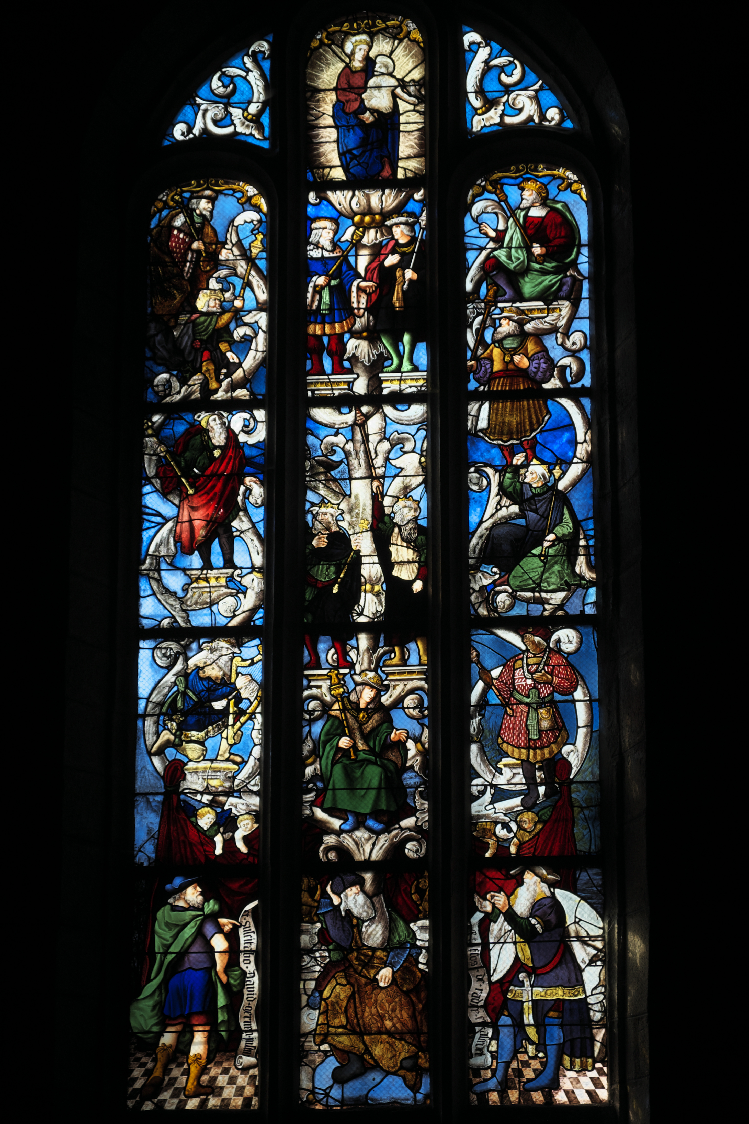 Wurzel-Jesse-Fenster (baie 4) in der katholischen Pfarrkirche St-Mathurin in Moncontour im Département Côtes-d’Armor (Region Bretagne/Frankreich), Bleiglasfenster von 1530 bis 1540